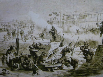 慶応４年２月１５日（1868年3月8日）に和泉国堺町内で起こった堺事件